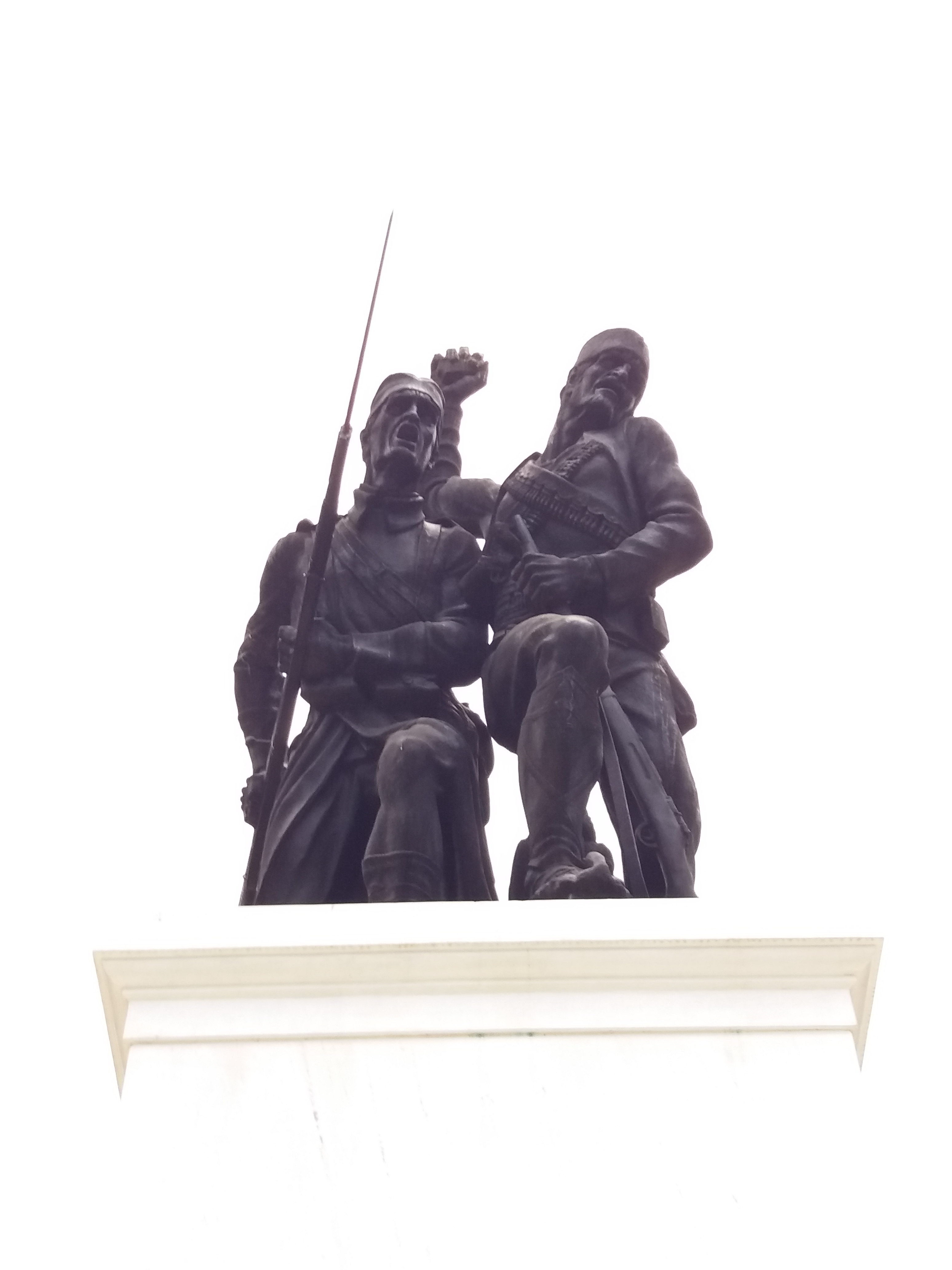 Srpski (latinica): Prokuplje